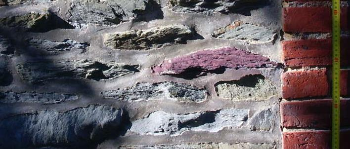 Photographie d'un mur en schiste briovérien, typique de l'ancien habitat populaire du pays de Rennes. La pierre rouge isolée à droite est un schiste ordovicien de Pont-Réant, utilisé surtout au sud-ouest de Rennes.